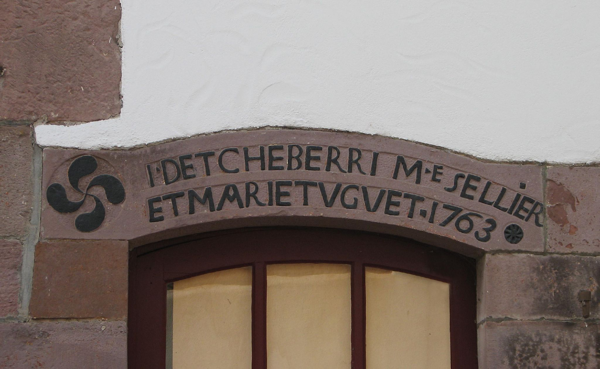 Lintel 1763